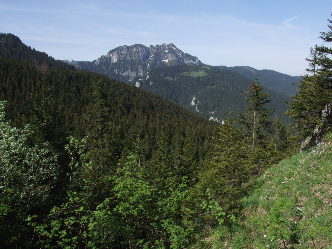 Kominiarski Wierch, widok z Polany Upłaz